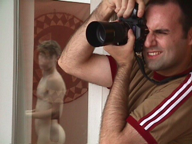 Il fotografo italiano GiovanBattista Brambilla. Foto di Giovanni Dall'Orto.